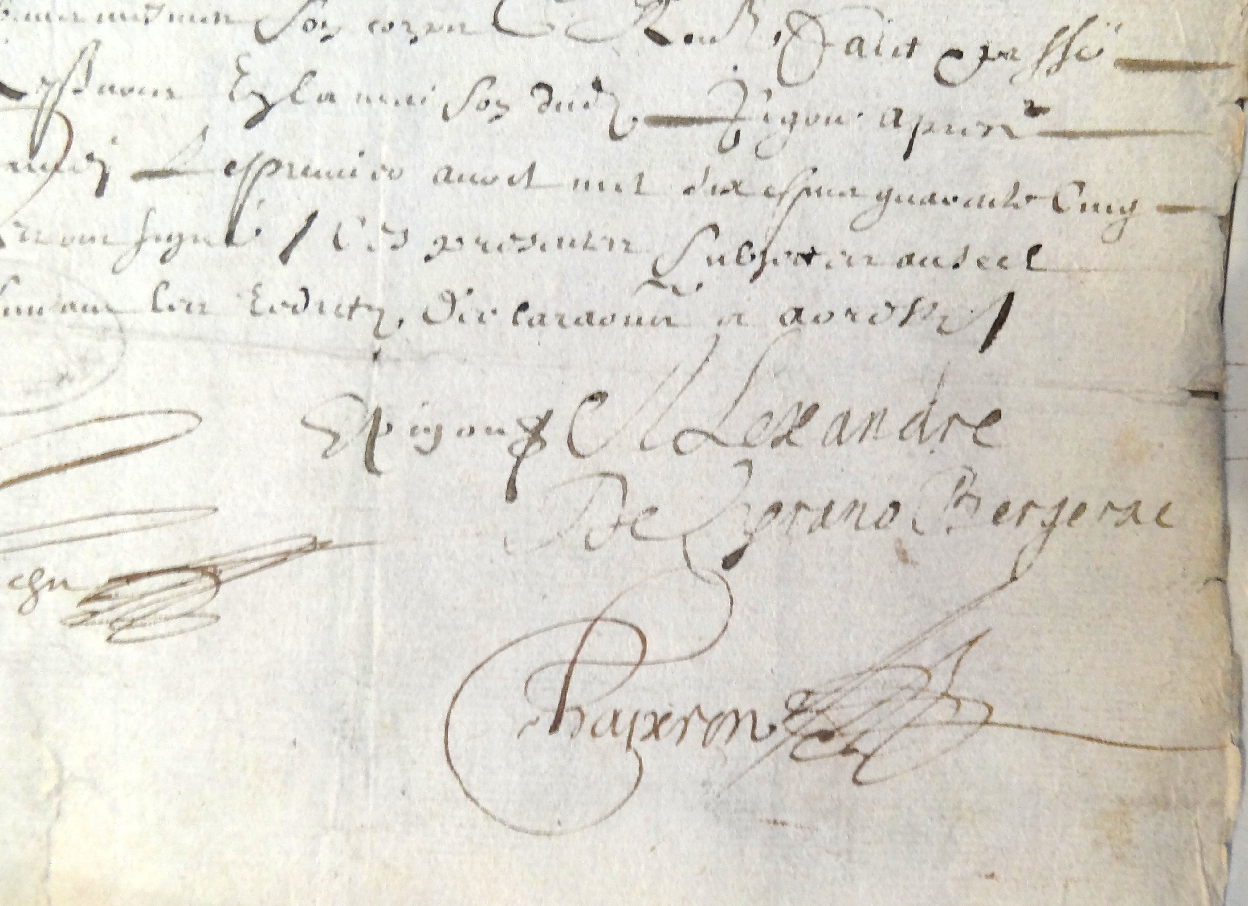 Obligation par Alexandre de Cyrano Bergerac [sic], écuyer, demeurant au faubourg Saint-Jacques, actuellement logé rue Neuve-Saint-Honoré, paroisse Saint-Roch, envers Élie Pigou, son hôte, maître barbier-chirurgien, d’une somme de 400 livres «pour l’avoir traicté, pansé, médicamenté et guéry de la maladie secrètte dont il estoit détenu» et l’avoir nourri et logé. Cette somme est payable moitié dans trois mois et moitié trois mois après. Document des Archives nationales [Cote: Minutier central/Étude CV, Claude Chaperon, pièce 614] en libre accès. Cliché réalisé le 1er décembre 2011 par FMR.